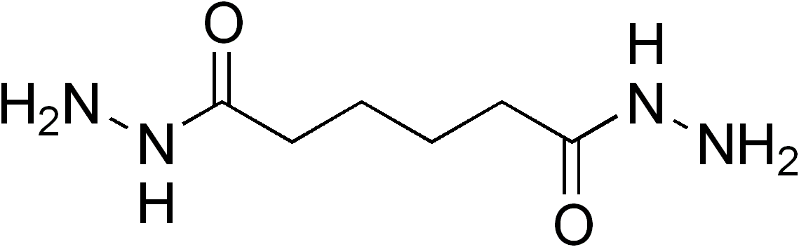 chemical structure of adipic acid dihydrazide (Adipic dihydrazide; Adipohydrazide; Adipyl hydrazide)